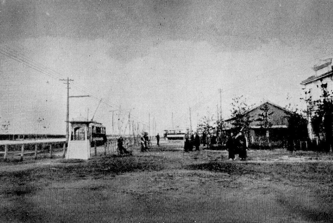 開通直後の熱田電気軌道水族館前停留所